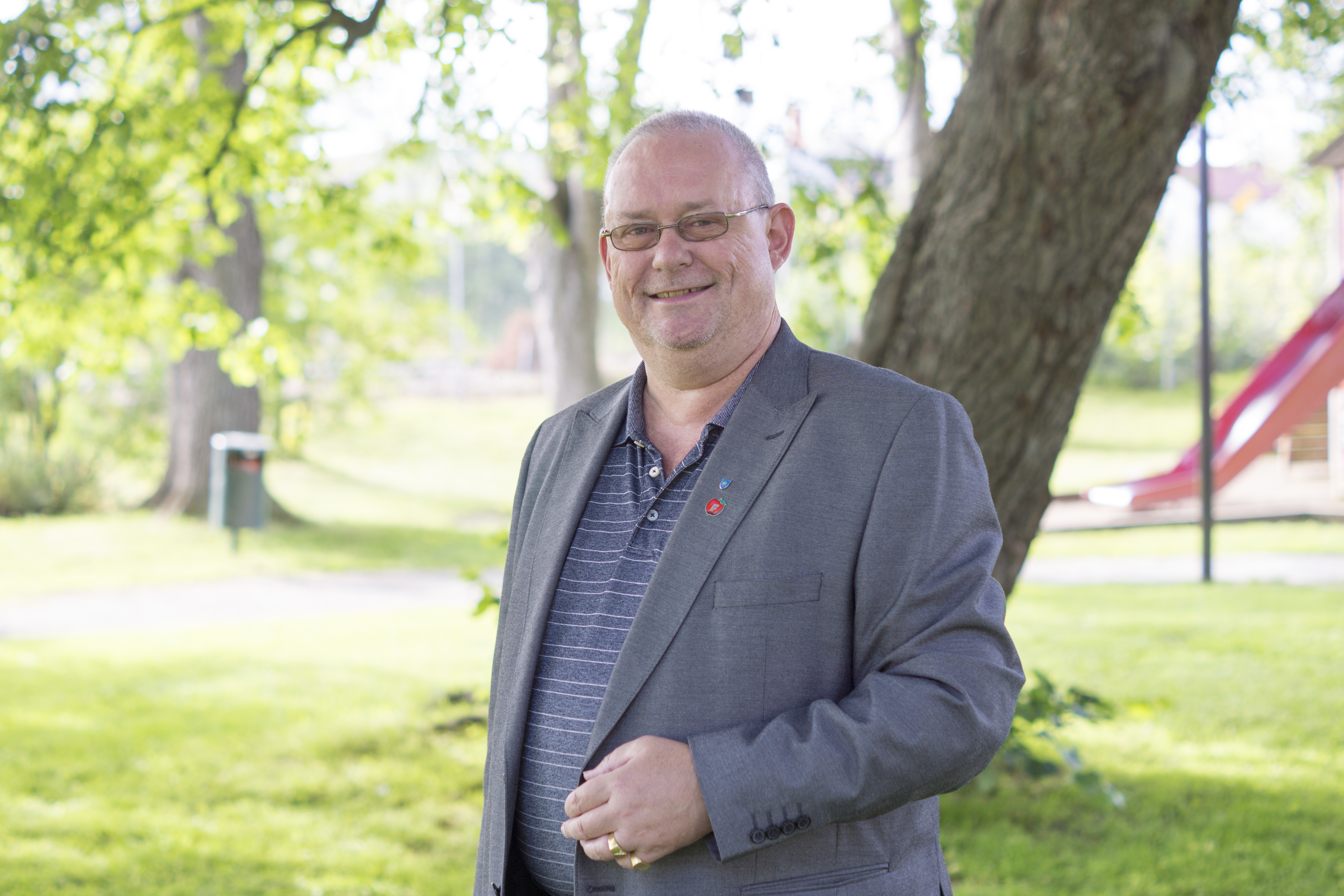 Norsk politiker.